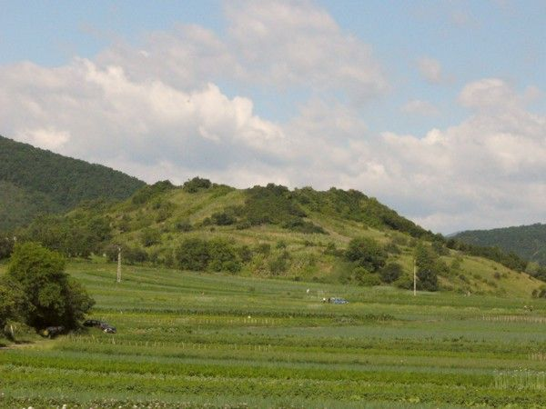 Dealul vechii cetati Moldovenesti; fortress hill